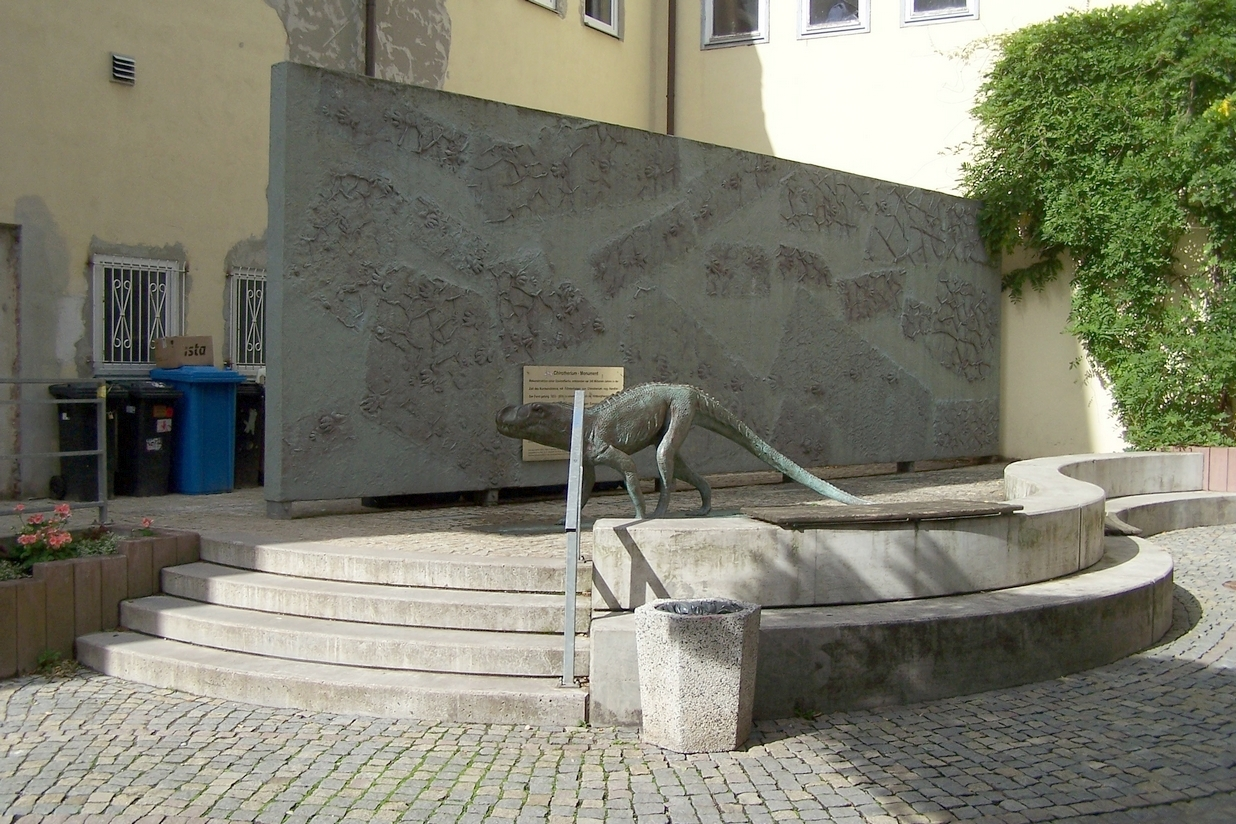 Gesamtansicht des Cheirotherium Monuments am Marktplatz von Hildburghausen.